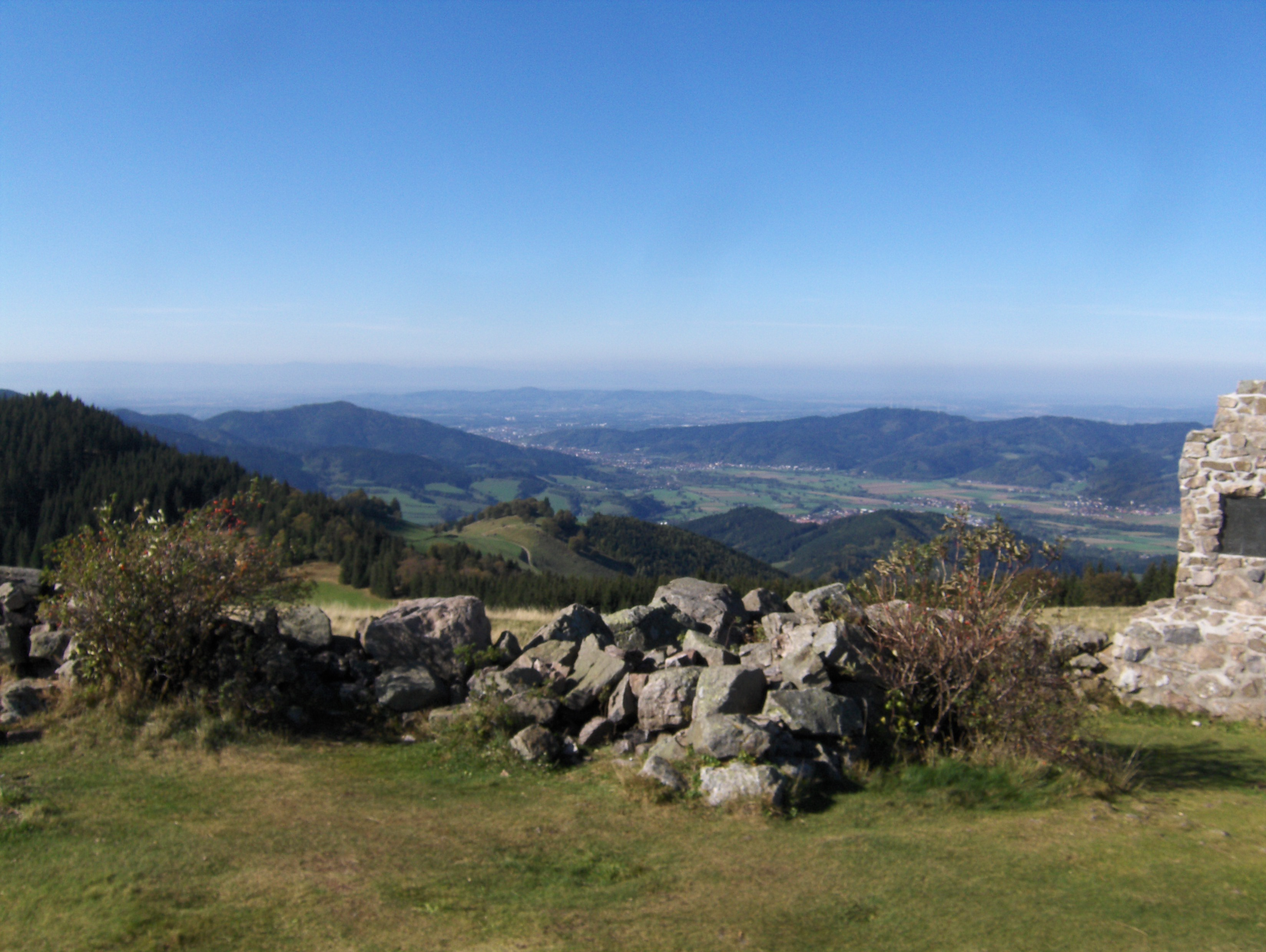 Blick vom Hinterwaldkopf ins Dreisamtal. Rechts der Gedenkstein für die Opfer der beiden Weltkriege.